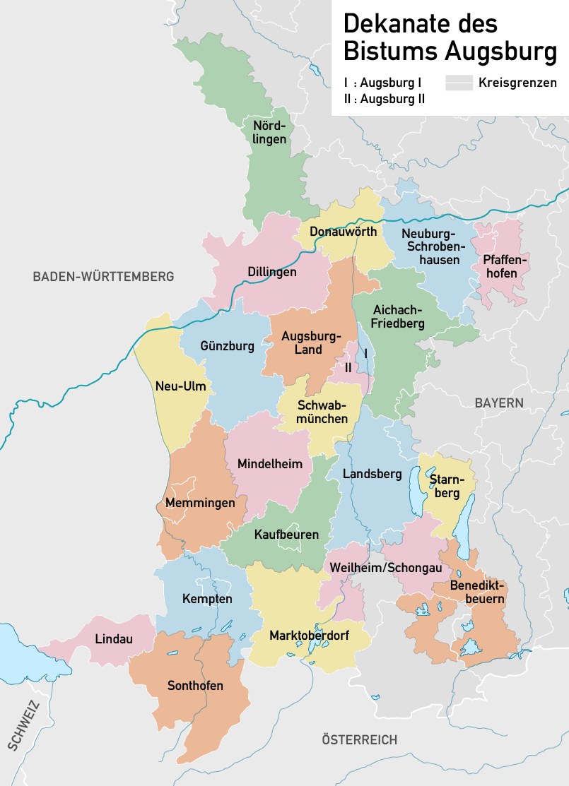 Karte des Bistums Augsburg und seiner Dekanate